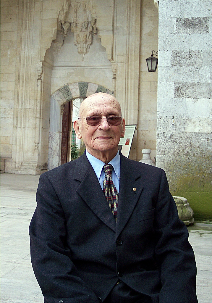 Ratip Kazancıgil, Edirne. Fotoğraf: Enver Şengül